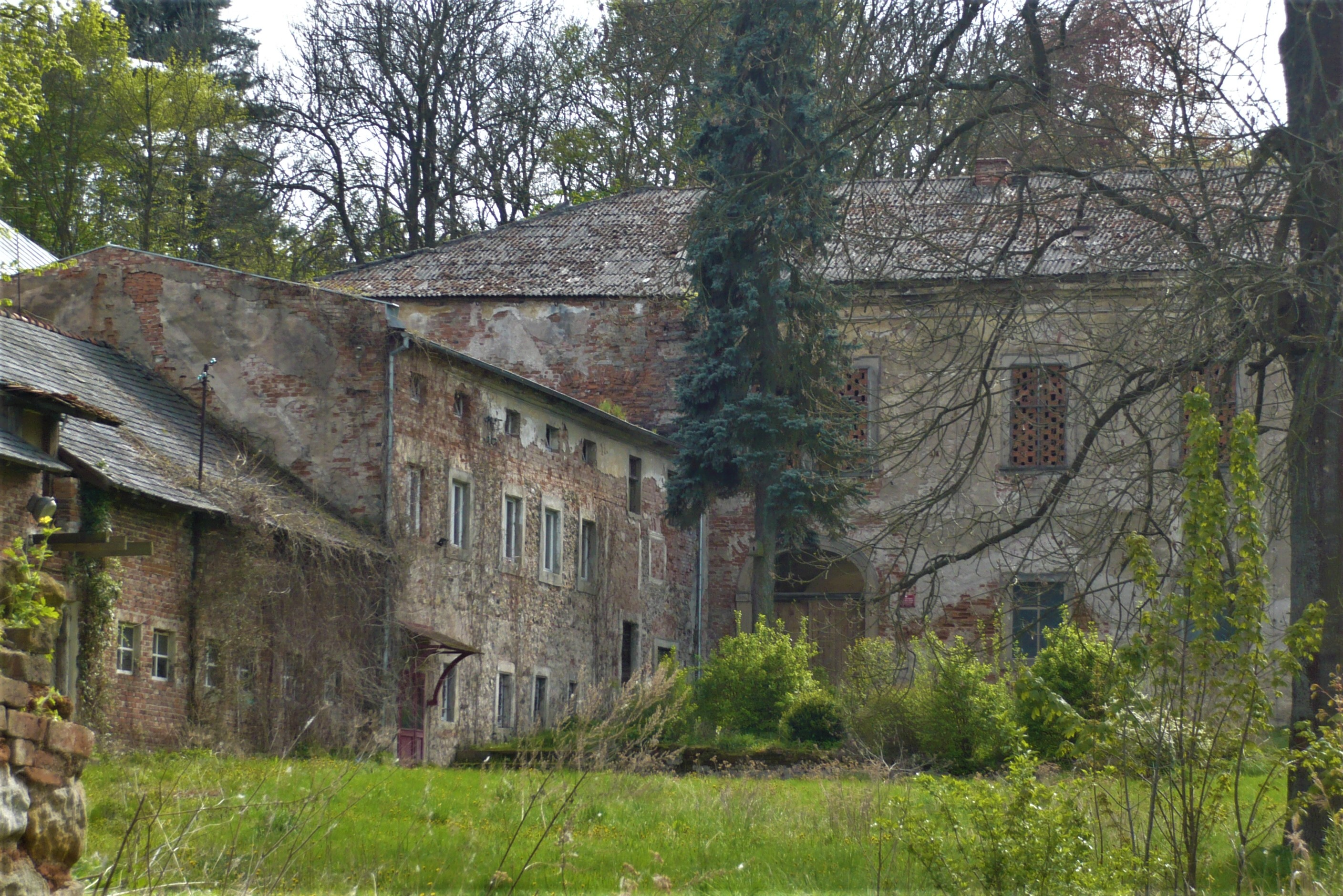 Pałac w Korytowie